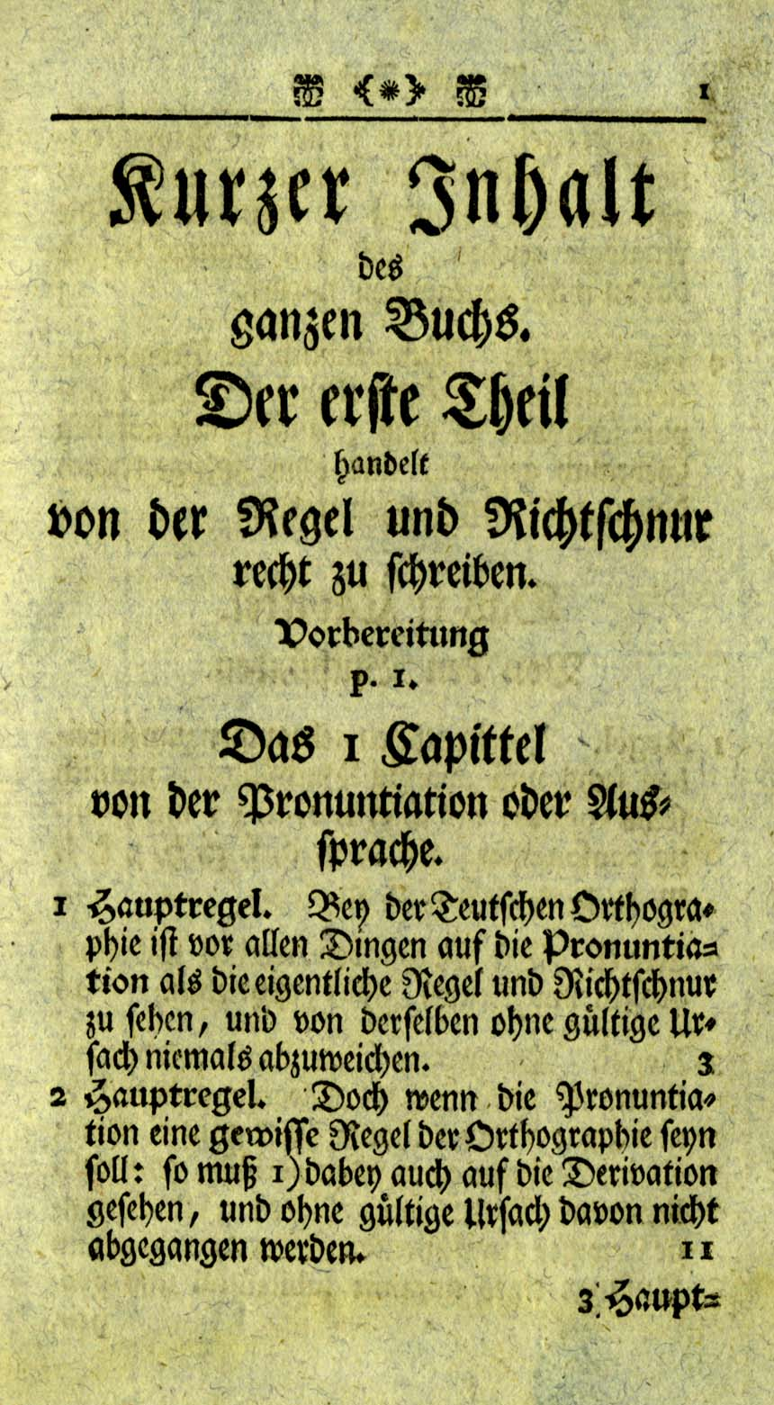 Hieronymus Freyer: Anweisung zur Teutschen Orthographie. Halle 1746. Inhalt 1